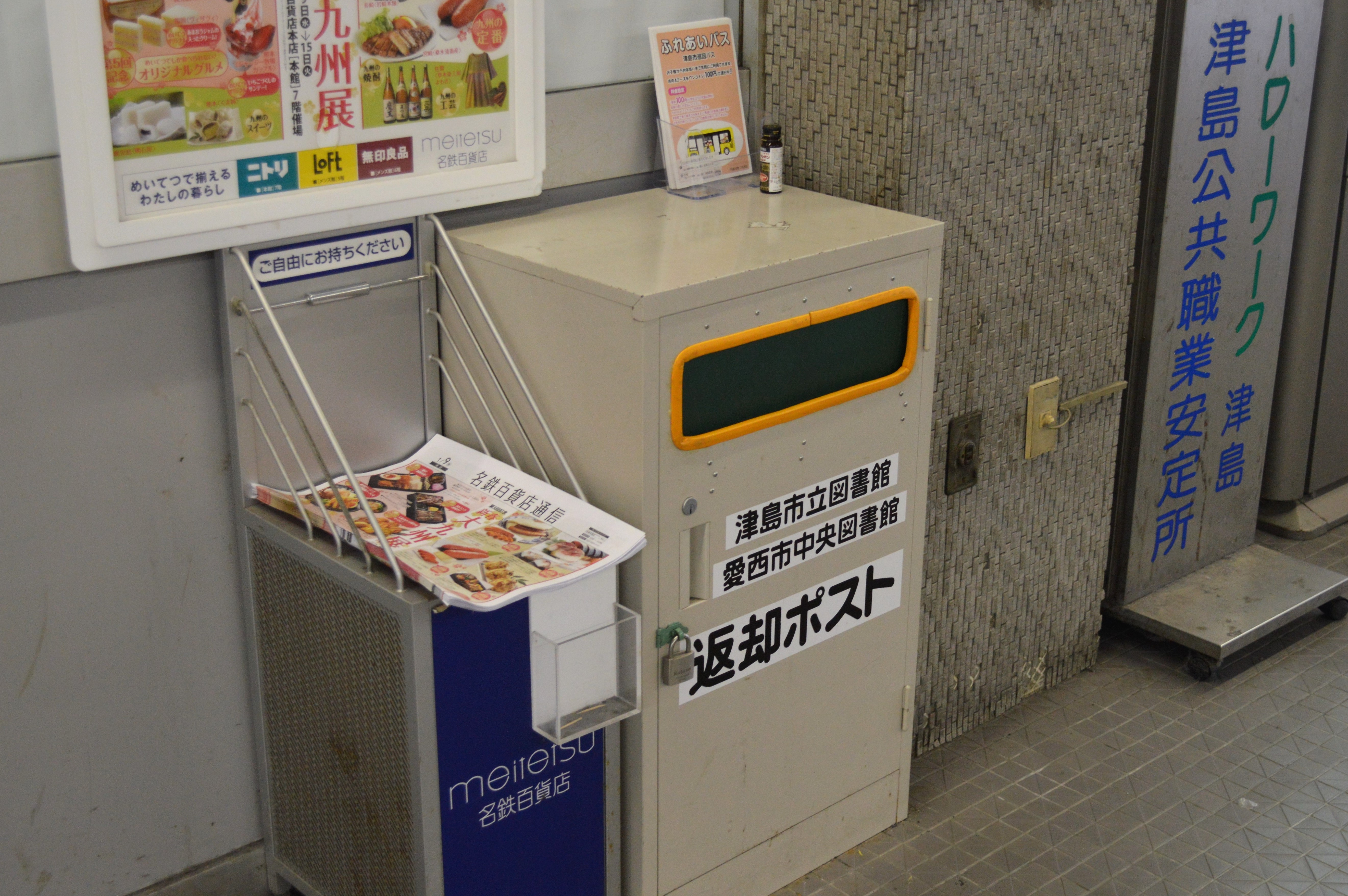 愛知県津島市の名鉄津島駅構内にある返却ポスト。津島市立図書館と愛西市中央図書館の2自治体による共同の返却ポストである。